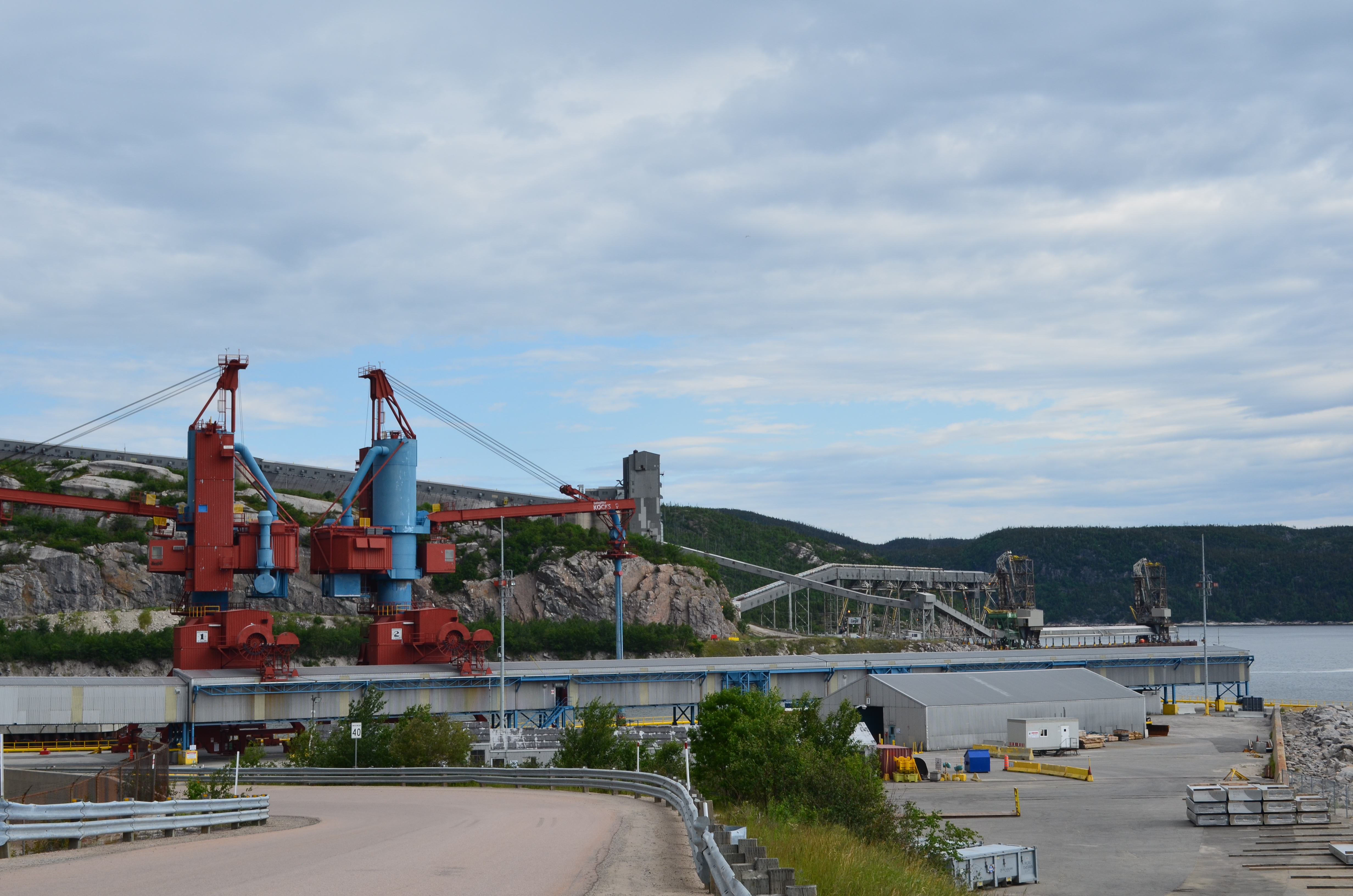 Grues de chargements au quai de l'Alcoa, Baie-Comeau